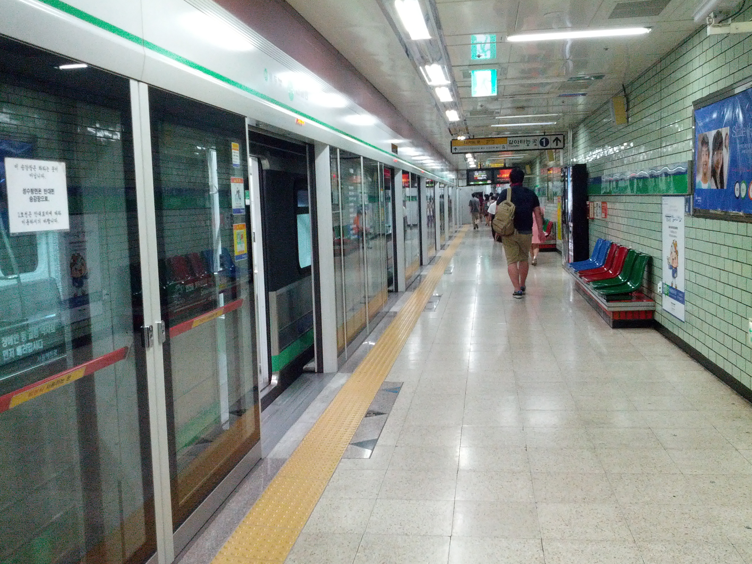 2호선 신설동역 승강장